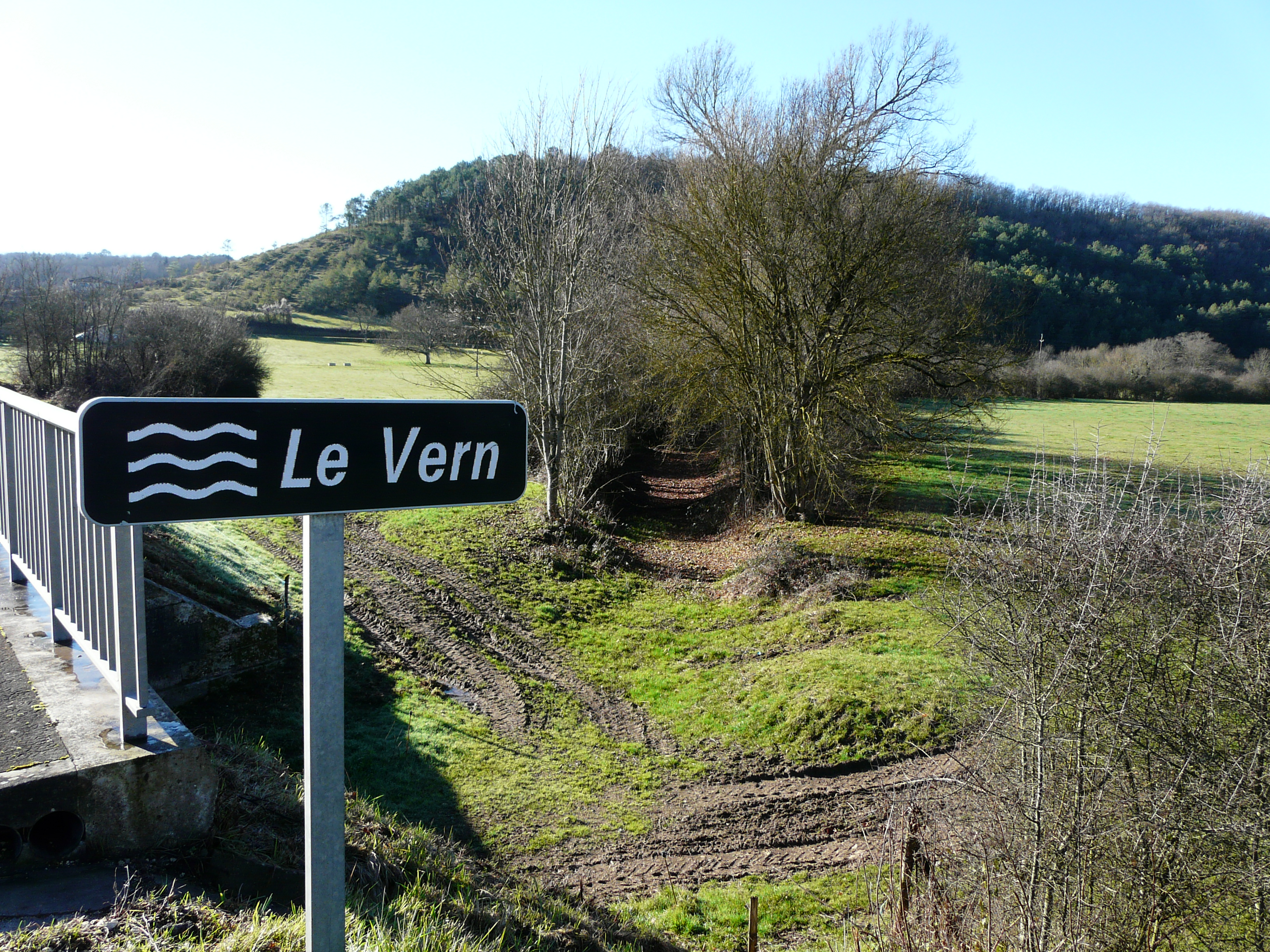 Le lit du Vern à sec au Pont de Bordas, en aval de la route nationale 21, Grun-Bordas, Dordogne, France.